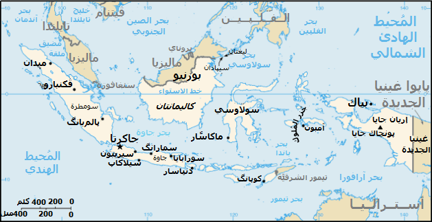 خارطة إندونيسيا.